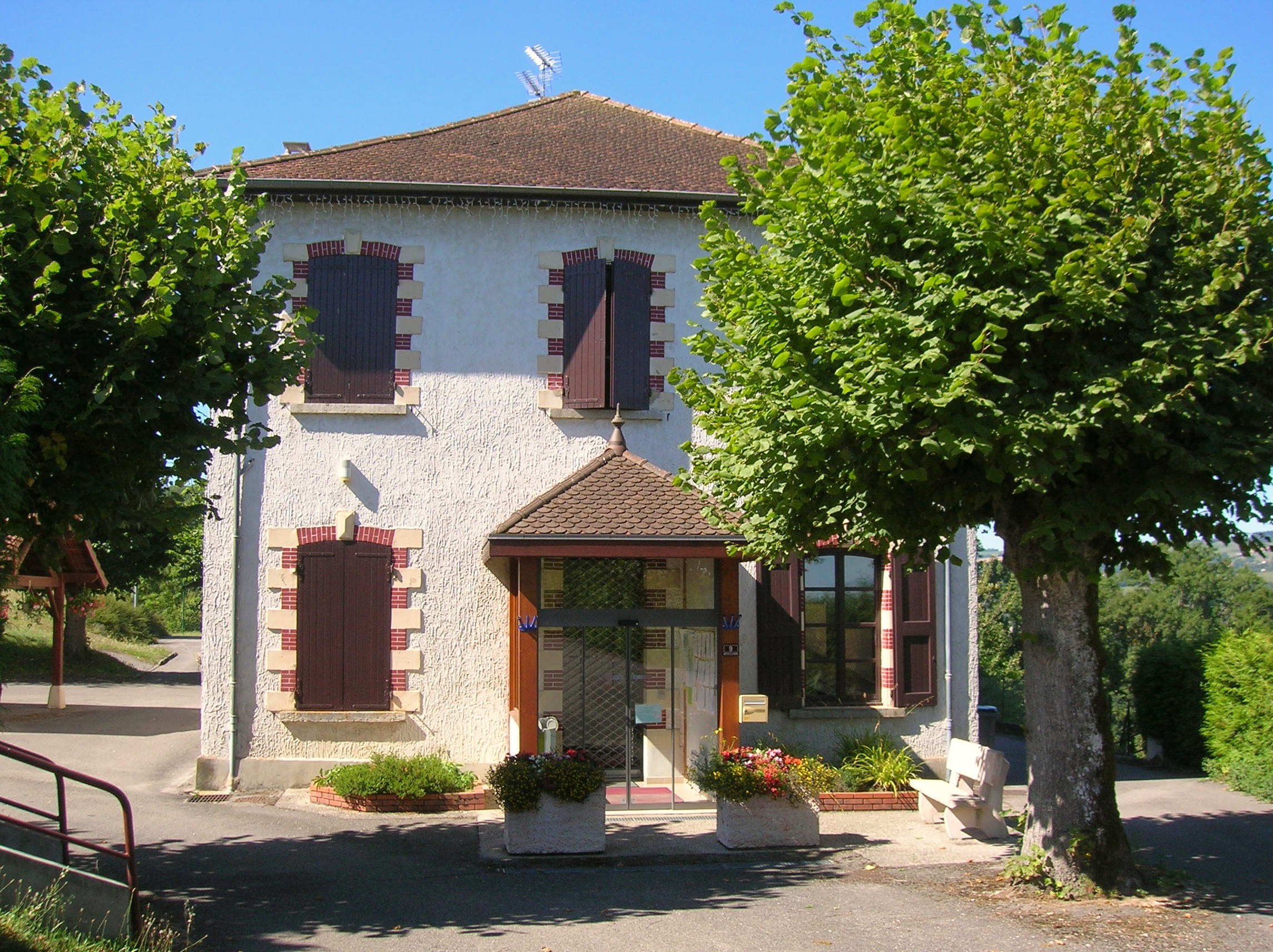 La mairie de Chassignieu, Isère, AuRA, France.